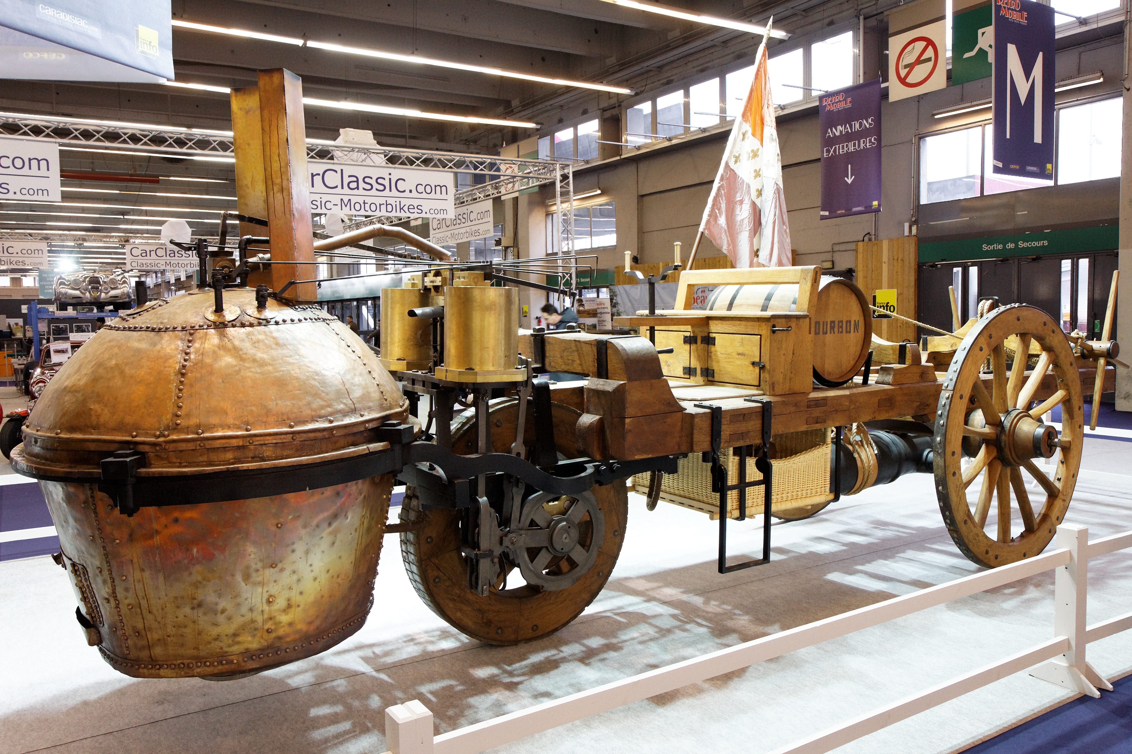 Photographie prise lors du salon rétromobile 2011 à Paris, porte de Versailles.